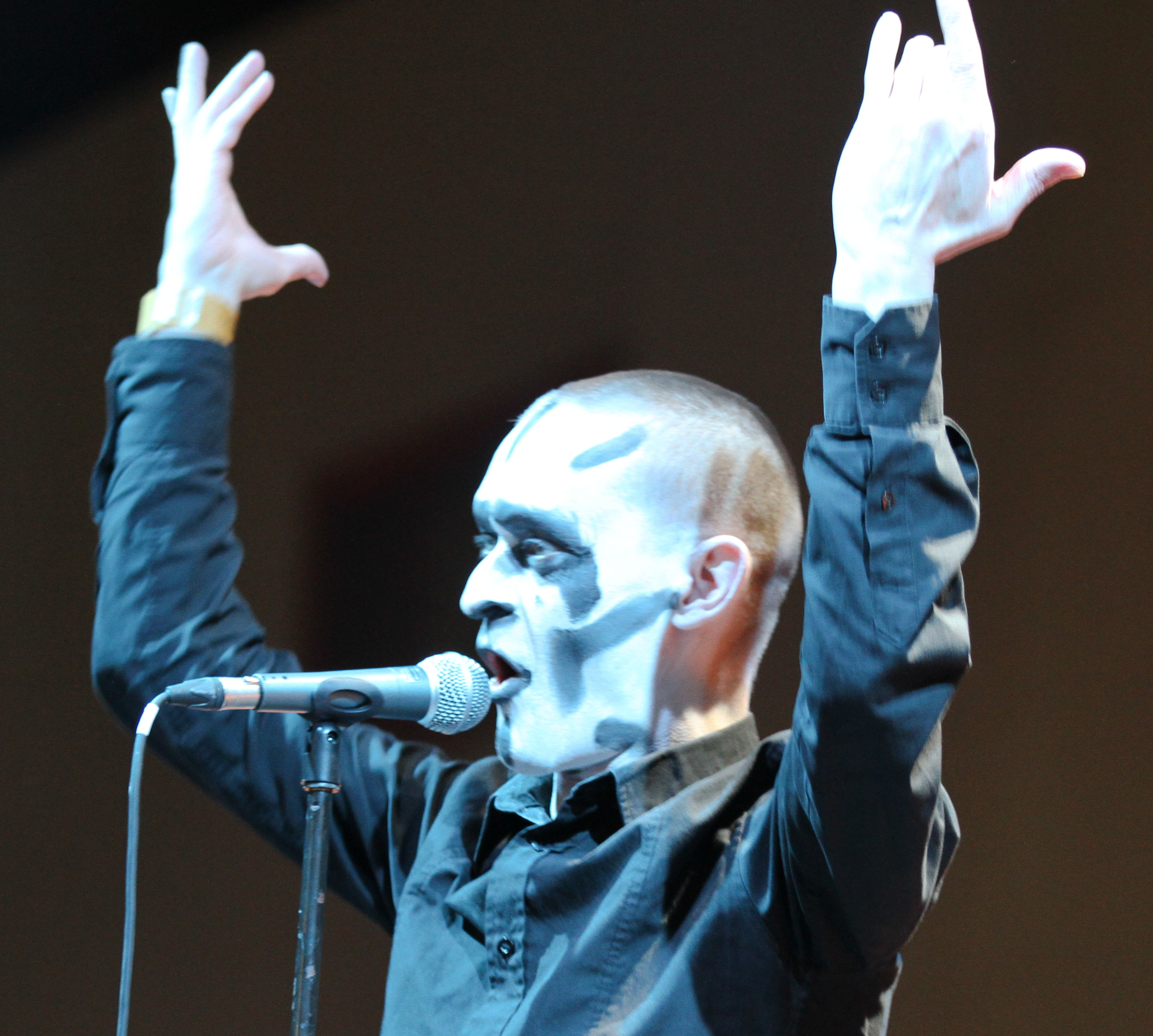 Stefan Ackermann von Das Ich auf dem Wave-Gotik-Treffen 2013 in der Agra-Halle.